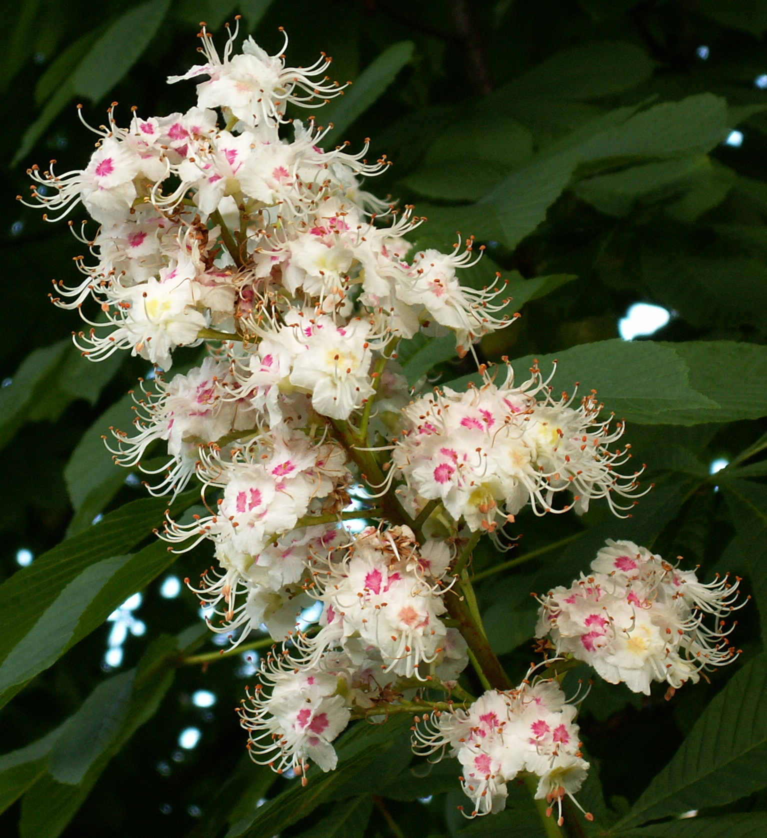 Aesculus hippocastanum